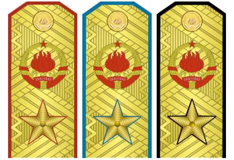 Опис: Еполете за раме војног звања Маршал Југославије сва три рода војске.